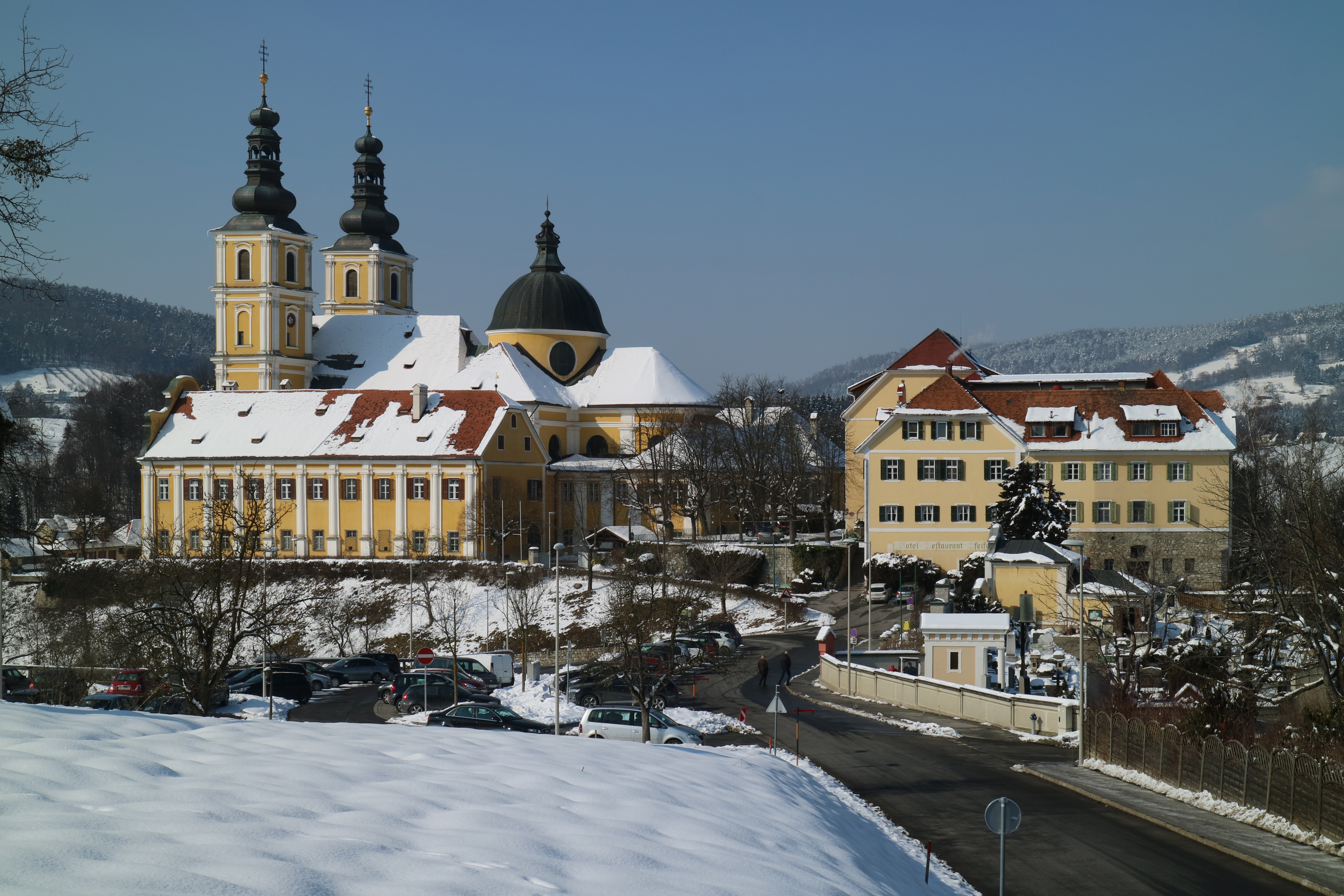 Basilika Mariatrost und Kirchenwirt, Ansicht von Südosten, Graz